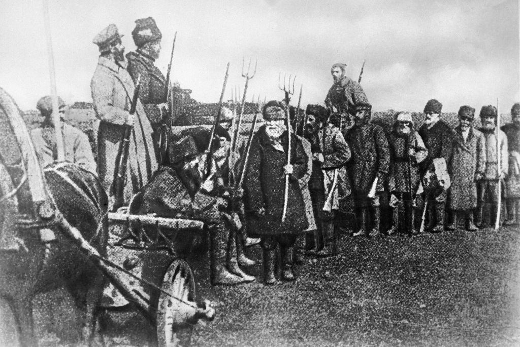 Тамбовское восстание (крестьяне)